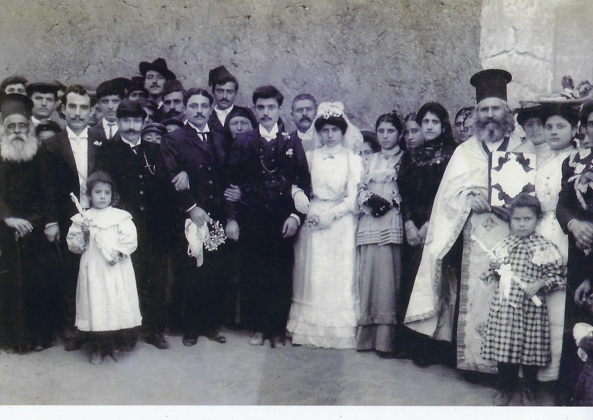 Yiakoumis gamos